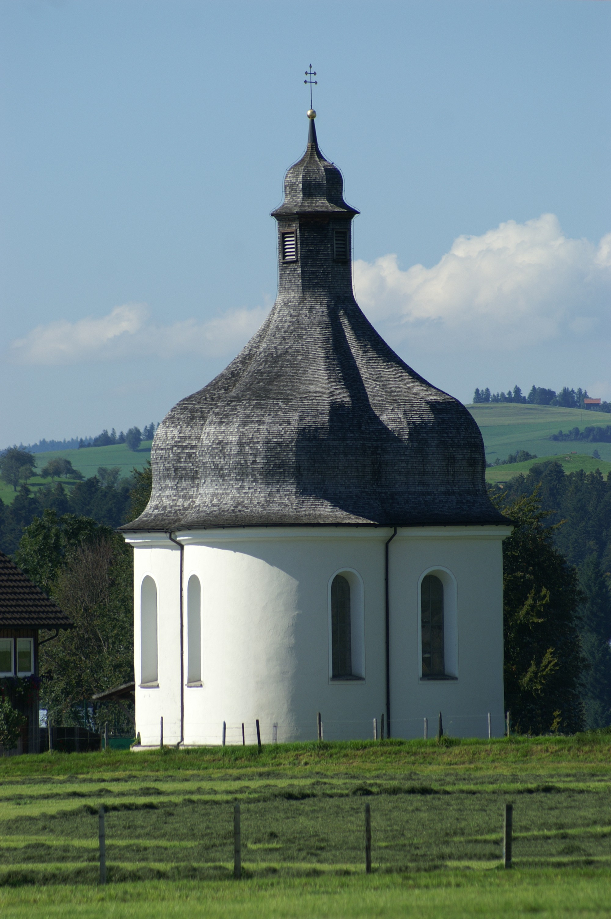 die St. Anna-Kapelle erbaut im Barockstil 1722 in Lingenau im Bregenzerwald , Vorarlberg